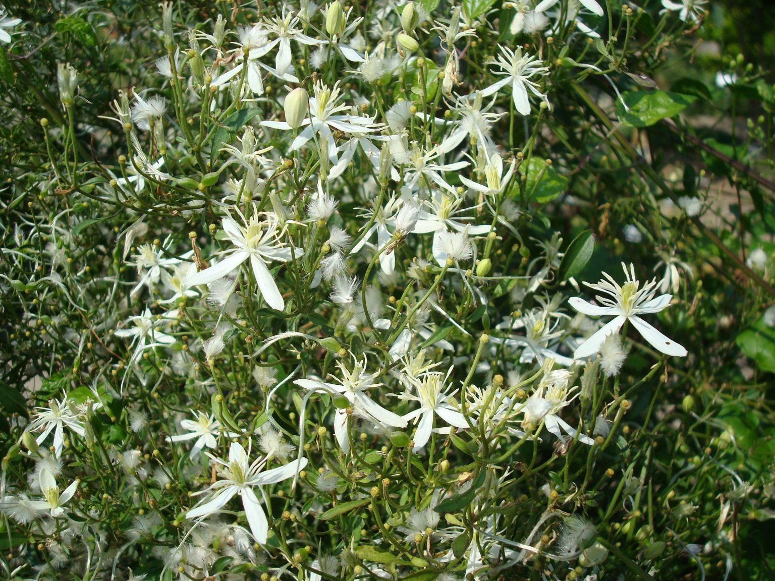 Clematis flammula au Parc de la Tête d'Or.